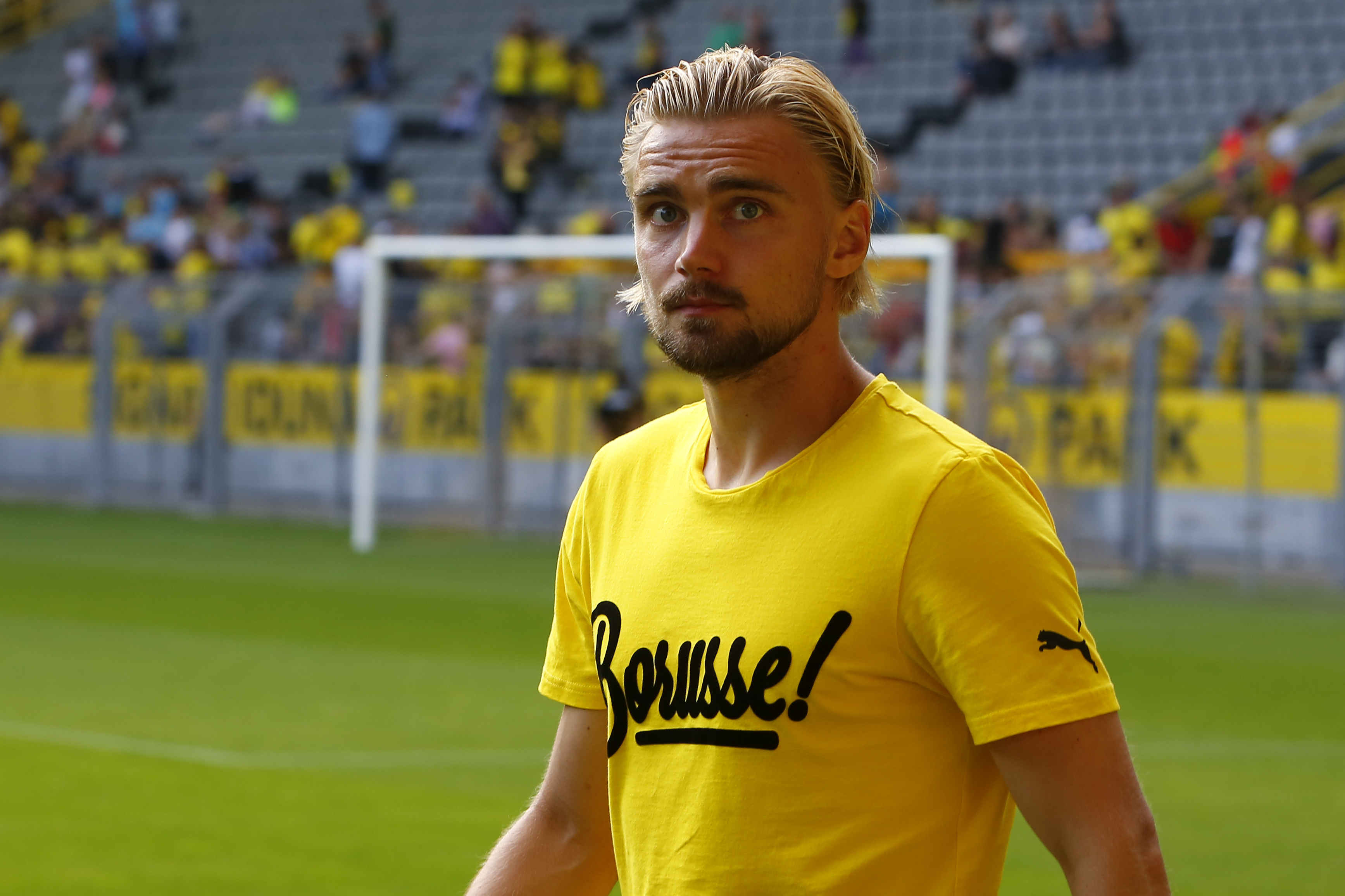 Marcel Schmelzer bei der Mannschaftsvorstellung von Borussia Dortmund am 09.08.2014 im Signal Iduna Park